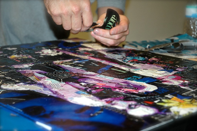 Réalisation d'un collage de Derek Gores, lors d'une de ses expositions/shows